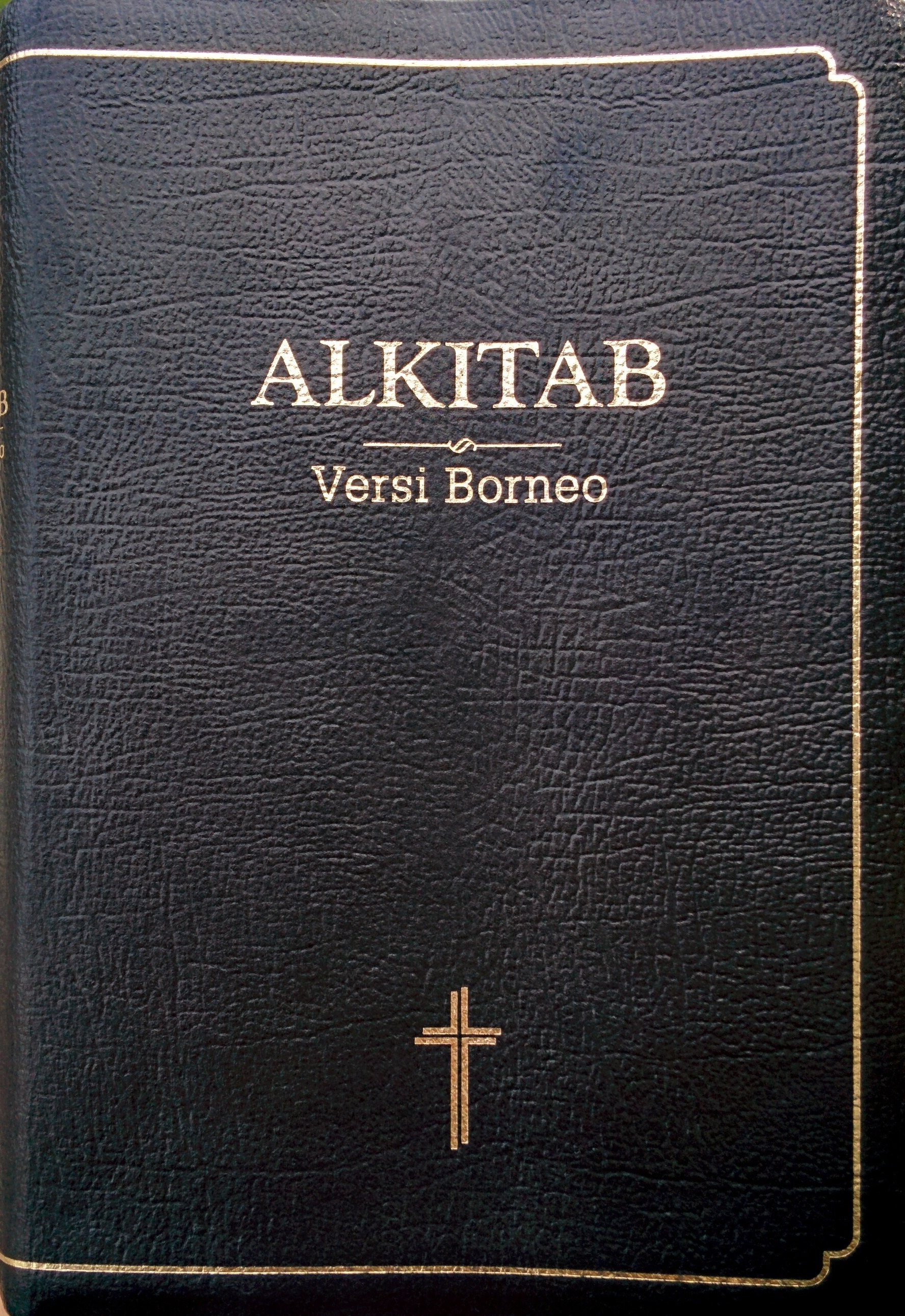 Alkitab Versi Borneo, LAB Network, Kota Kinabalu, Malaysia, Cetakan Edisi Terhad, Januari 2016